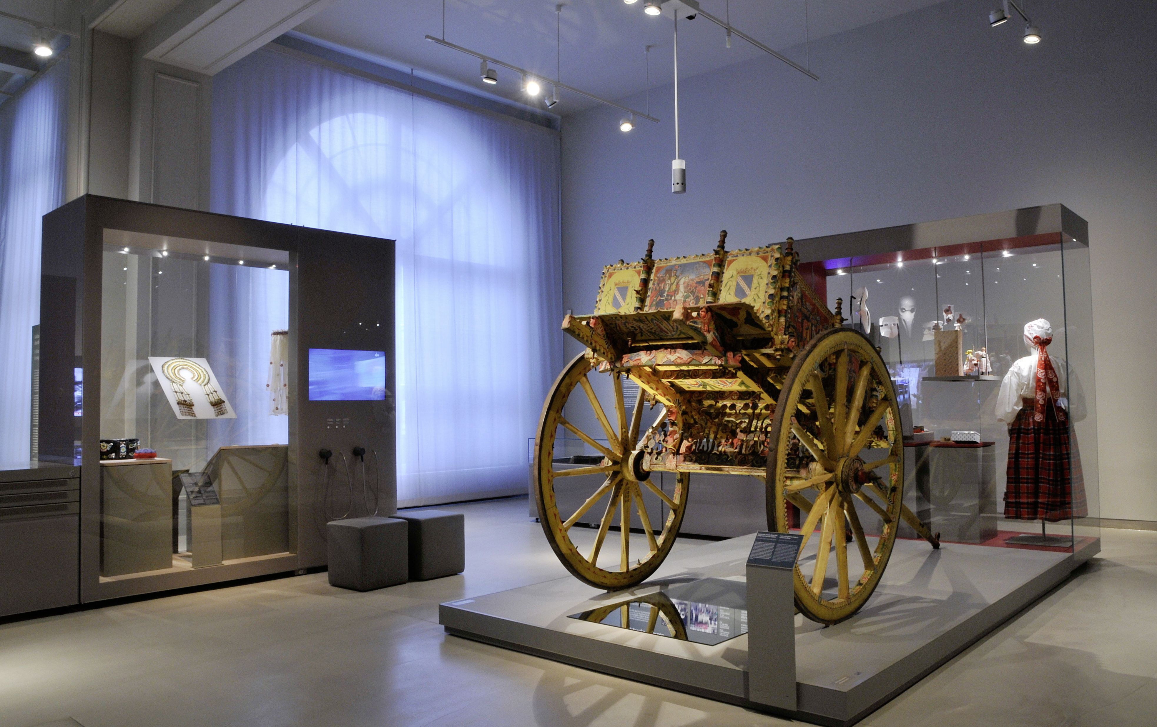 Blick in die neue Sammlungspräsentation, Thema: Mobilitäten-Migration